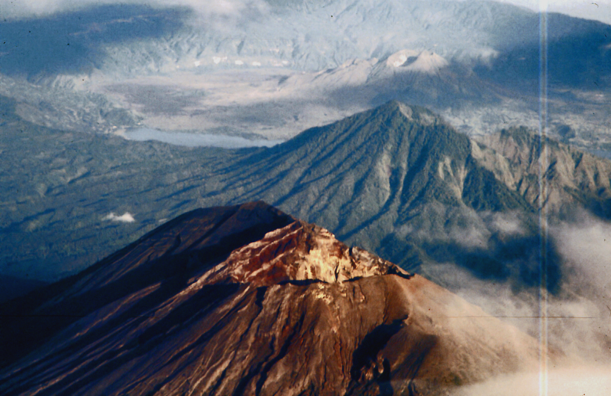 Krater des Agung, im Hintergrund Batur-Caldera